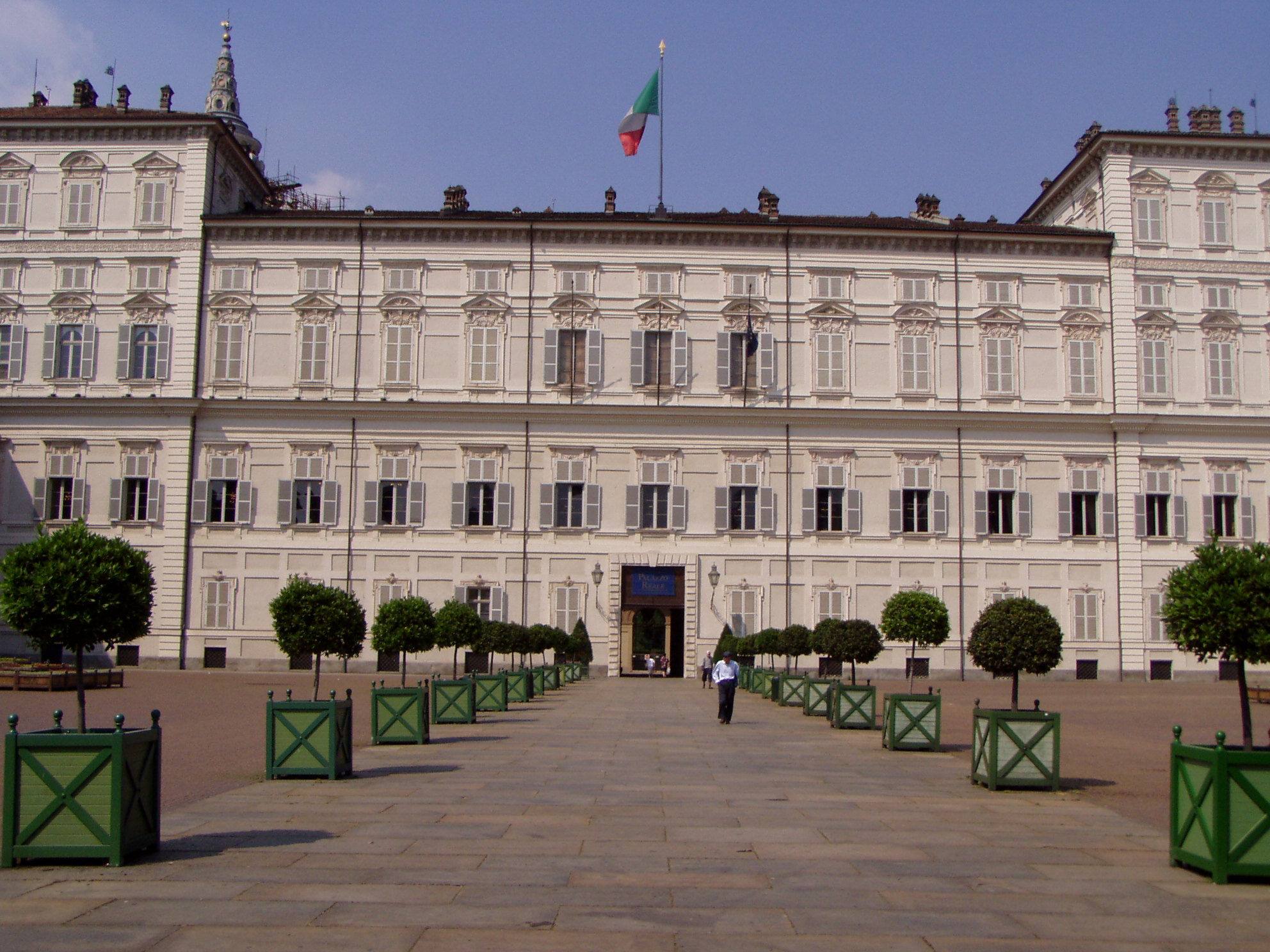 Palazzo Reale di Torino.